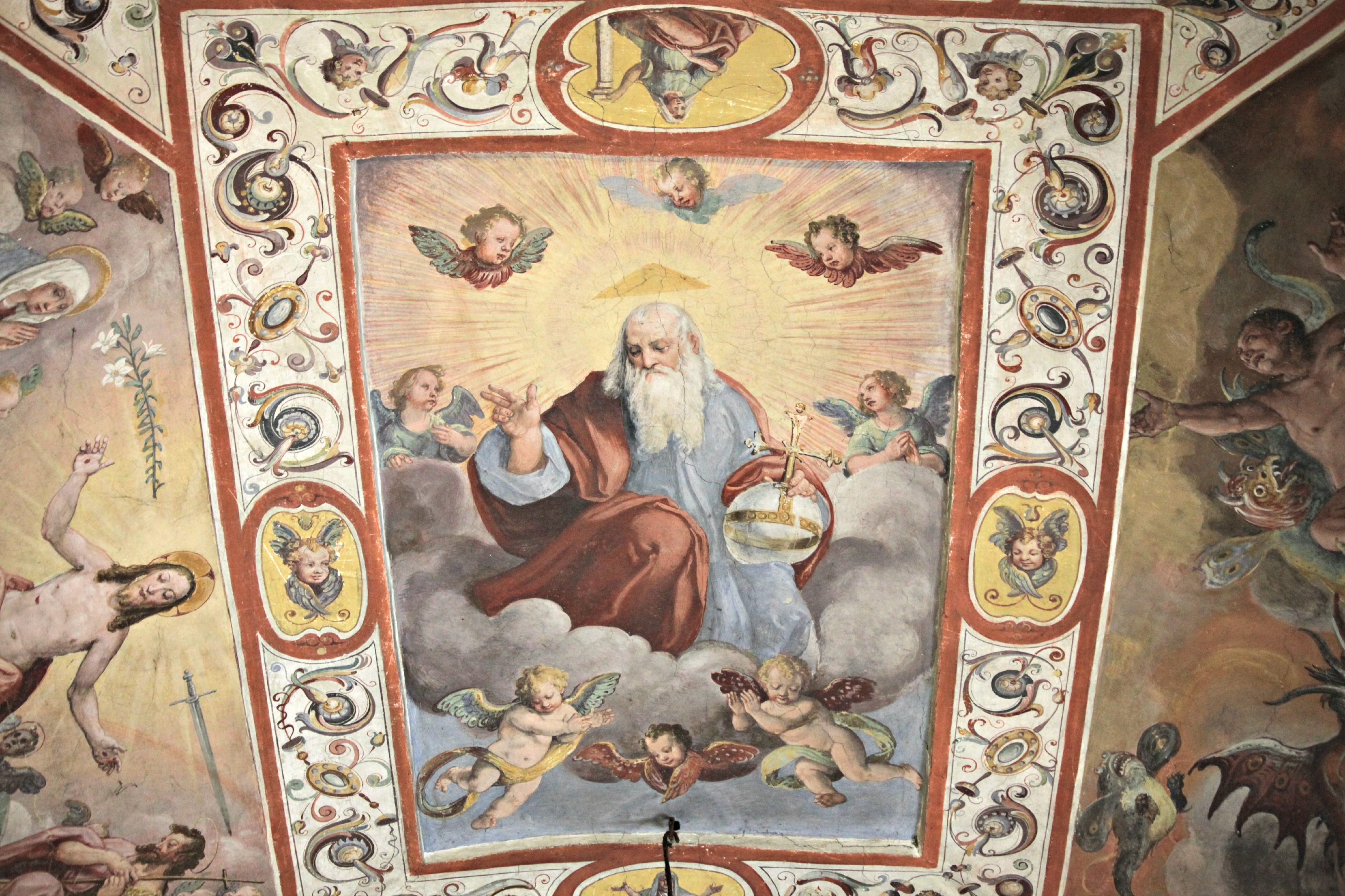 Dio Padre di Giovanni Stradano, 1583